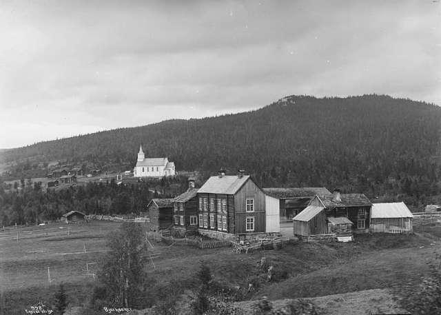 Frå Berkåk med Berkåk kyrkje